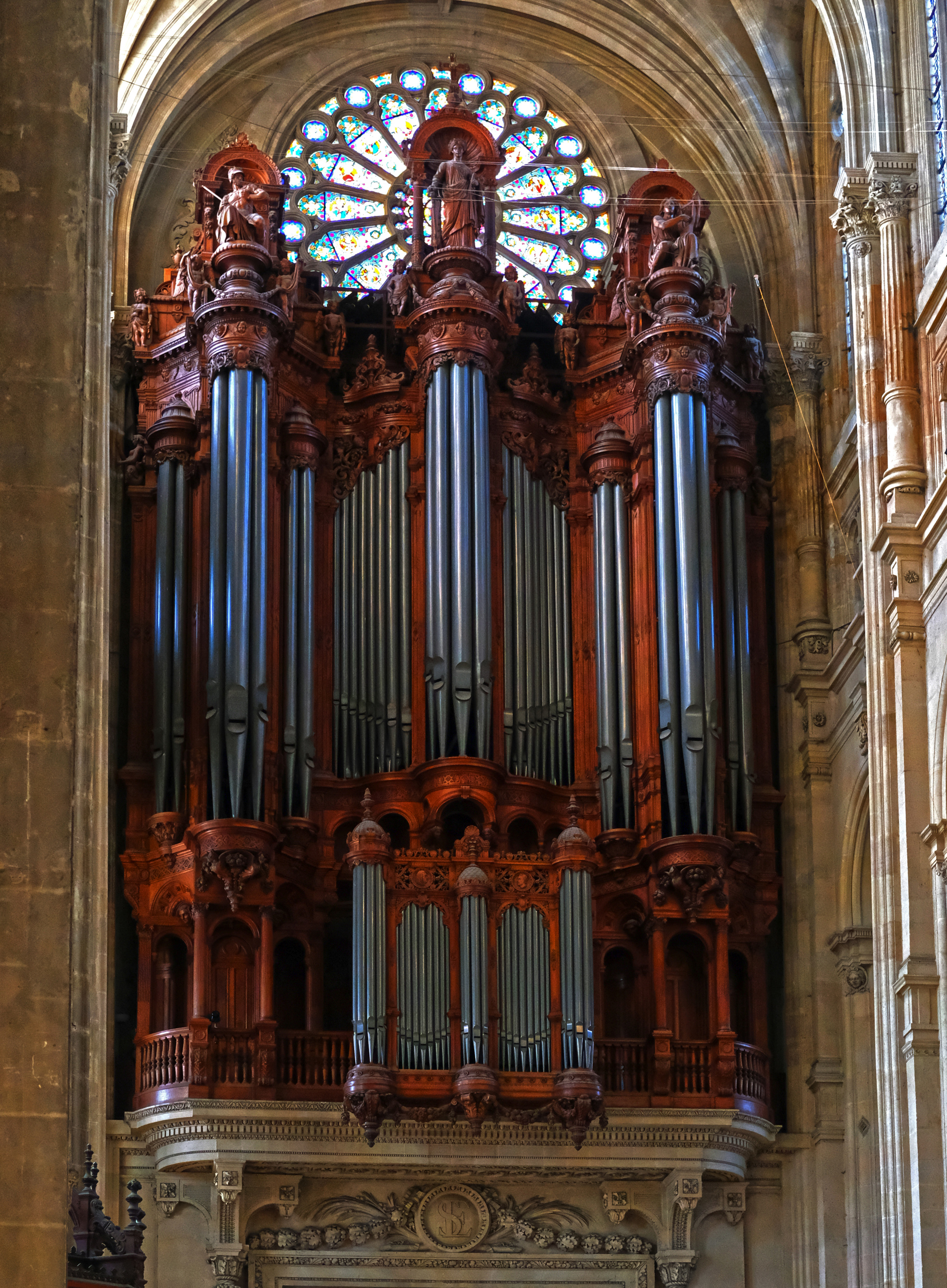 Église Saint-Eustache (orgue de tribune) - Paris Ier